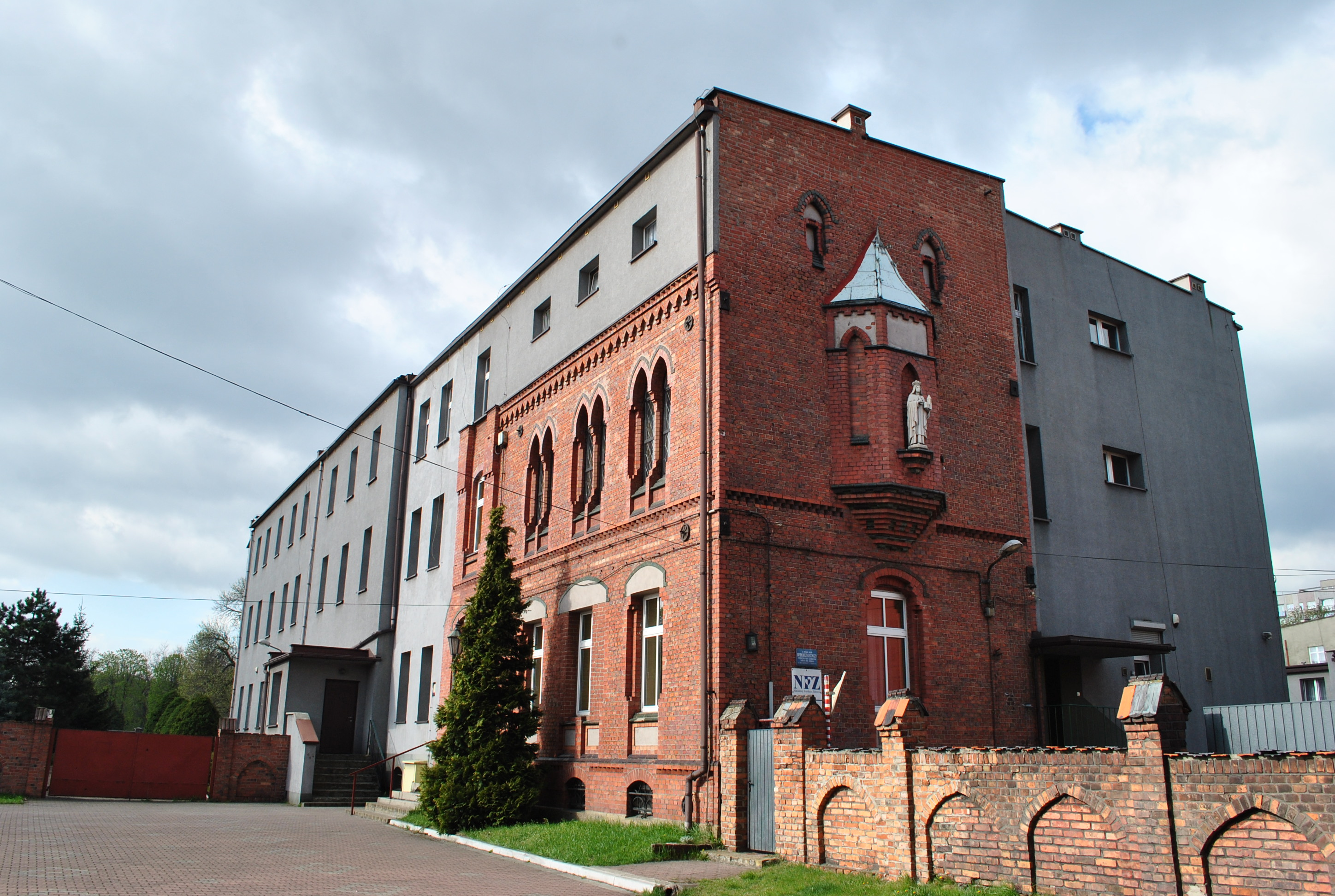 Katowice - Załęże. Zakład Opiekuńczo - Leczniczy przy parafii św. Józefa